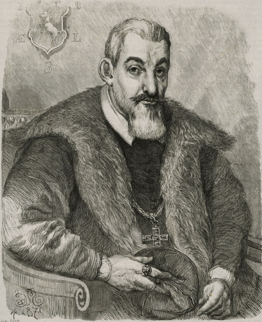 Jan Dymitr Solikowski (drzeworyt sztorcowy)